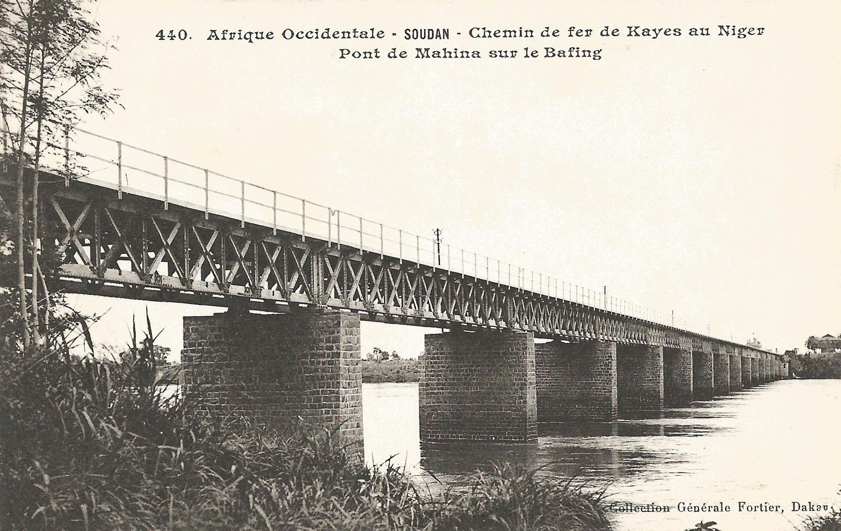 François-Edmond Fortier, Pont de Mahina sur le Bafing. Afrique Occidentale - Soudan - Chemin de fer de Kayes au Niger.